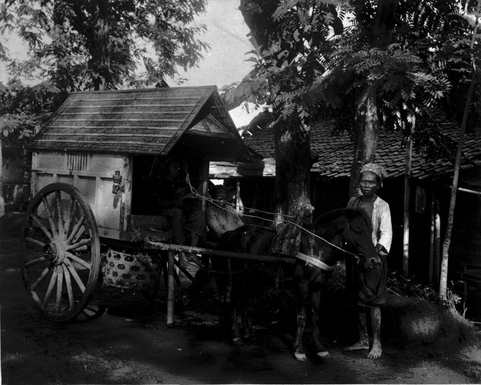 Foto. Paard en wagen als transportmiddel.